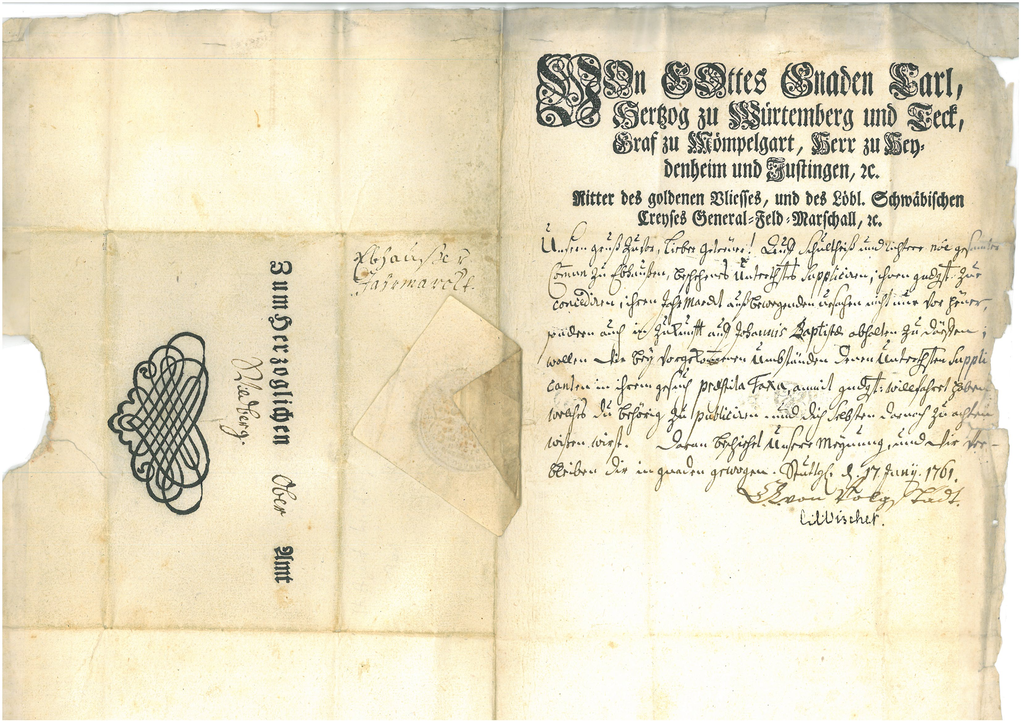 Schreiben an das Oberamt Wildberg über die Genehmigung für die Gemeinde Ebhausen für das Abhalten eines Jahrmarkfest auf Johannis Baptista (24. Juni) aus dem Jahr 1761